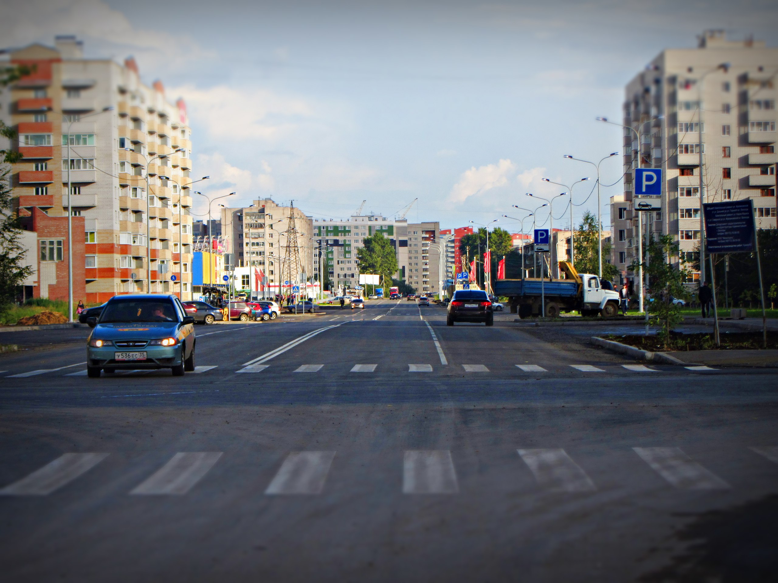 Улица Карла Маркса, Вологда, август 2015 года